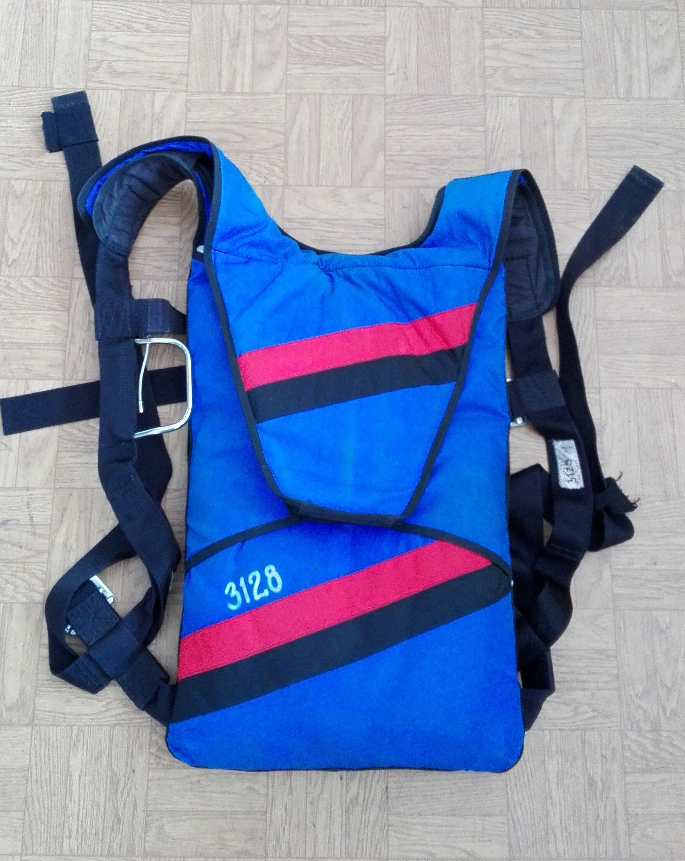 Spadochron ratowniczy plecowy MarS OP-094-1 — Sekcja samolotowa Aeroklubu Gliwickiego